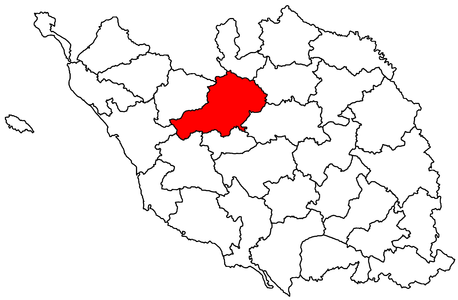 Le canton du Poiré-sur-Vie dans le découpage cantonal vendéen de 1973.